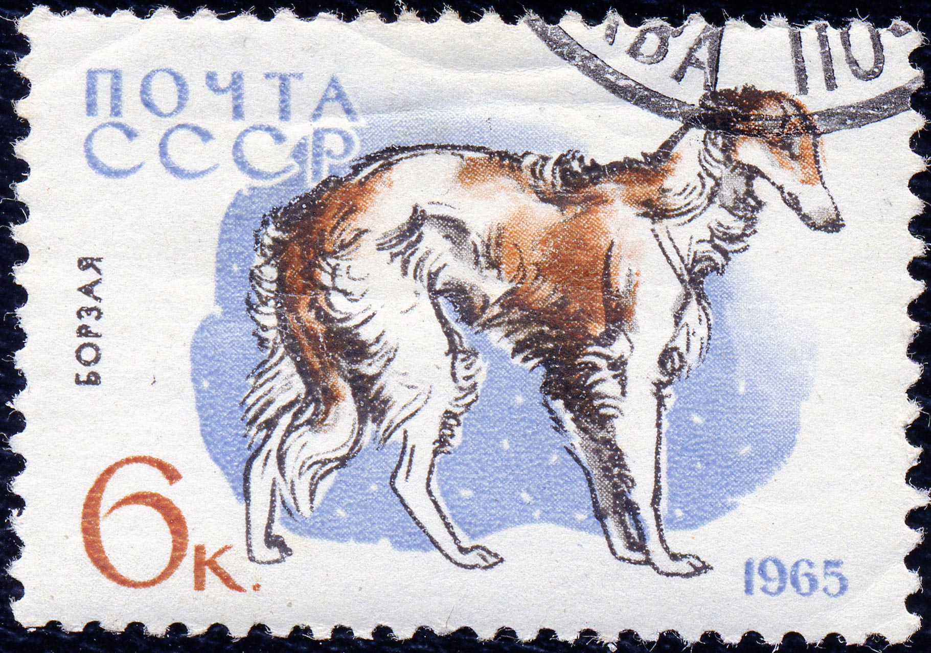 Почтовая марка СССР. 1965. Борзая